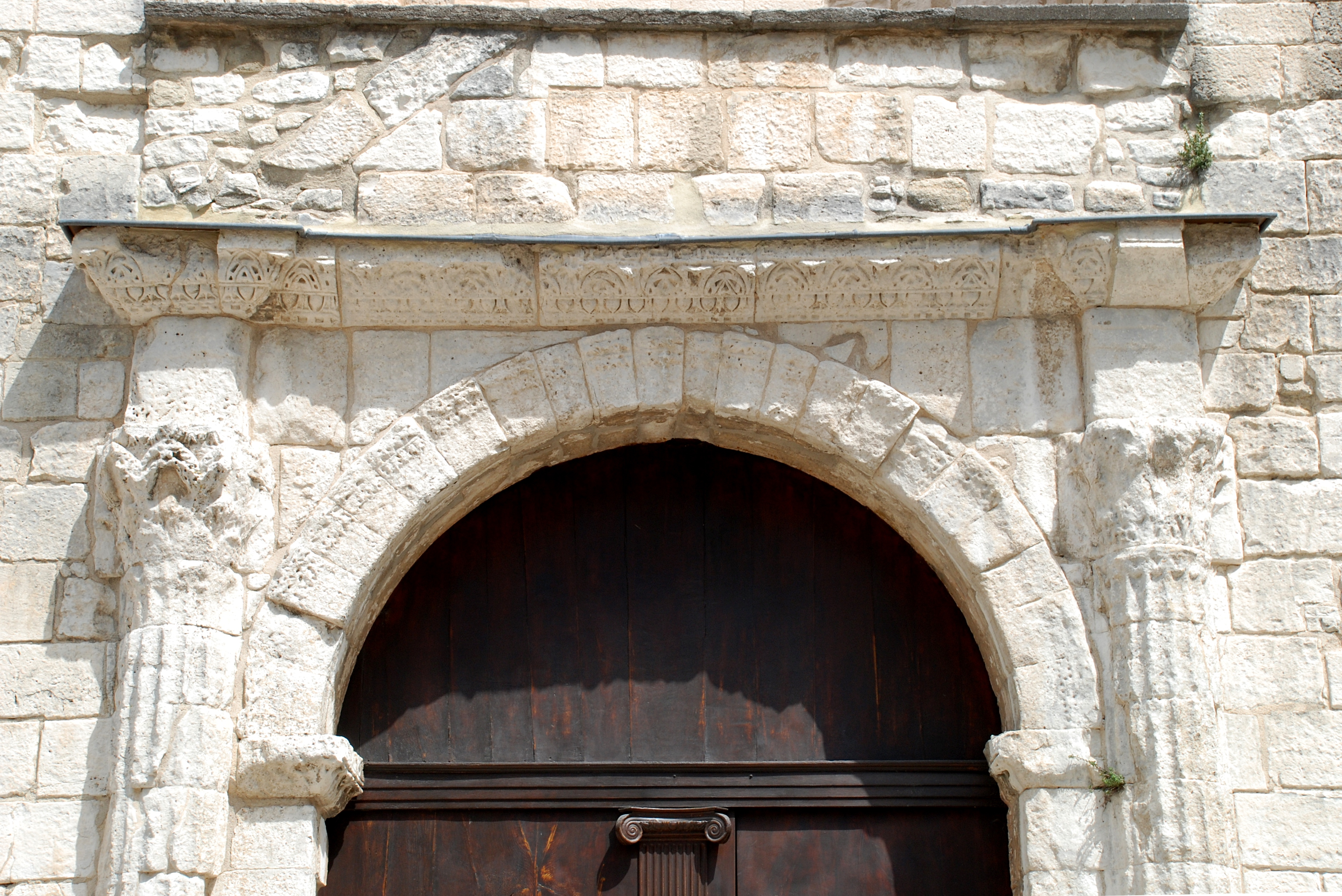 France - Provence - Vaucluse - Pernes-les-Fontaines - Notre-Dame-de-Nazareth